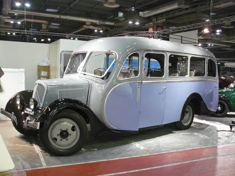 Retromobile 2012